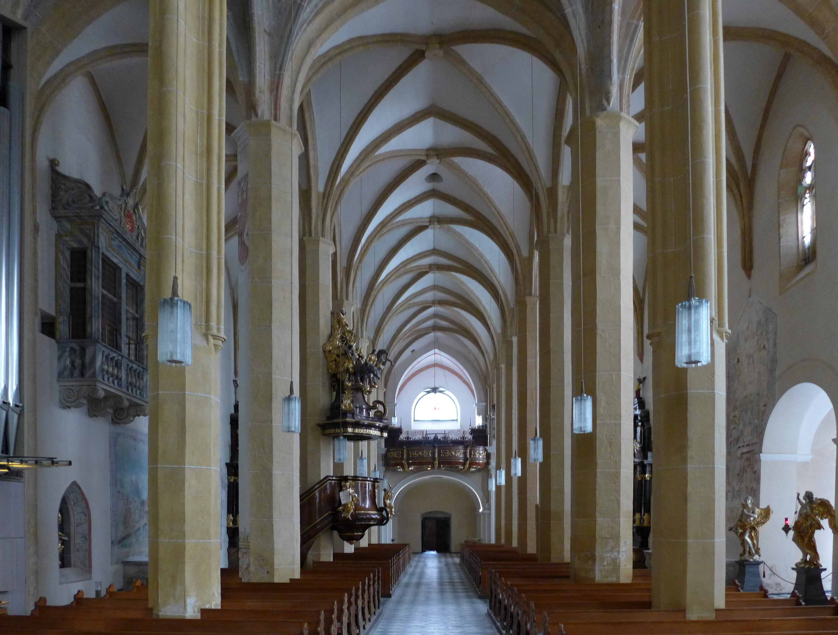 Stift St. Lambrecht - 3 Kirchenschiffe der gotischen Stiftskirche